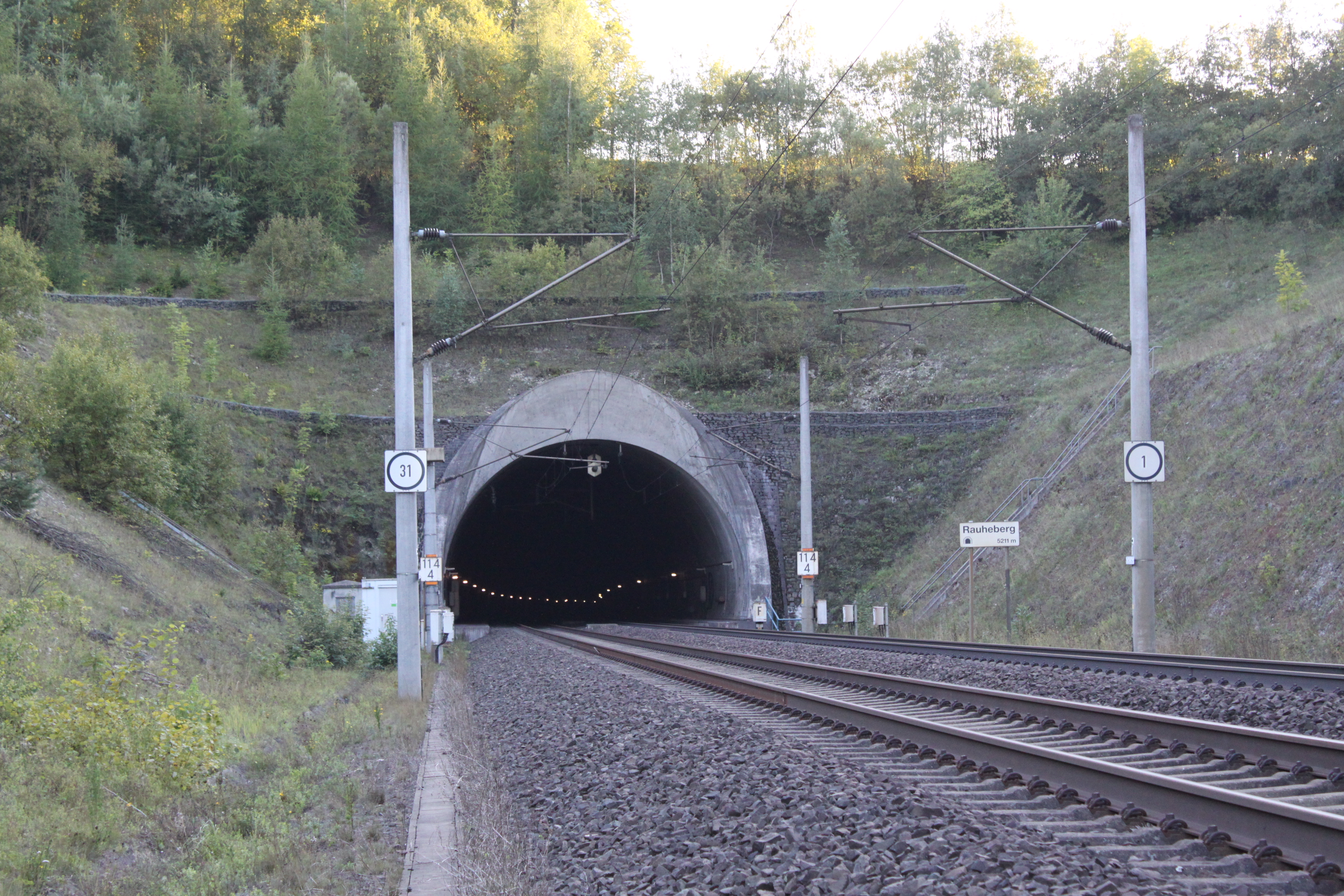 Überholbahnhof Jühnde